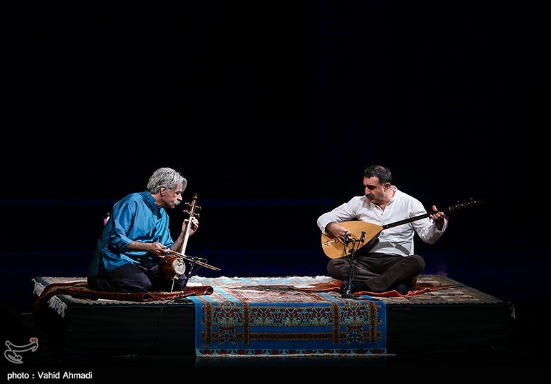 کنسرت کیهان کلهر و اردال ارزنجان در تالار وحدت